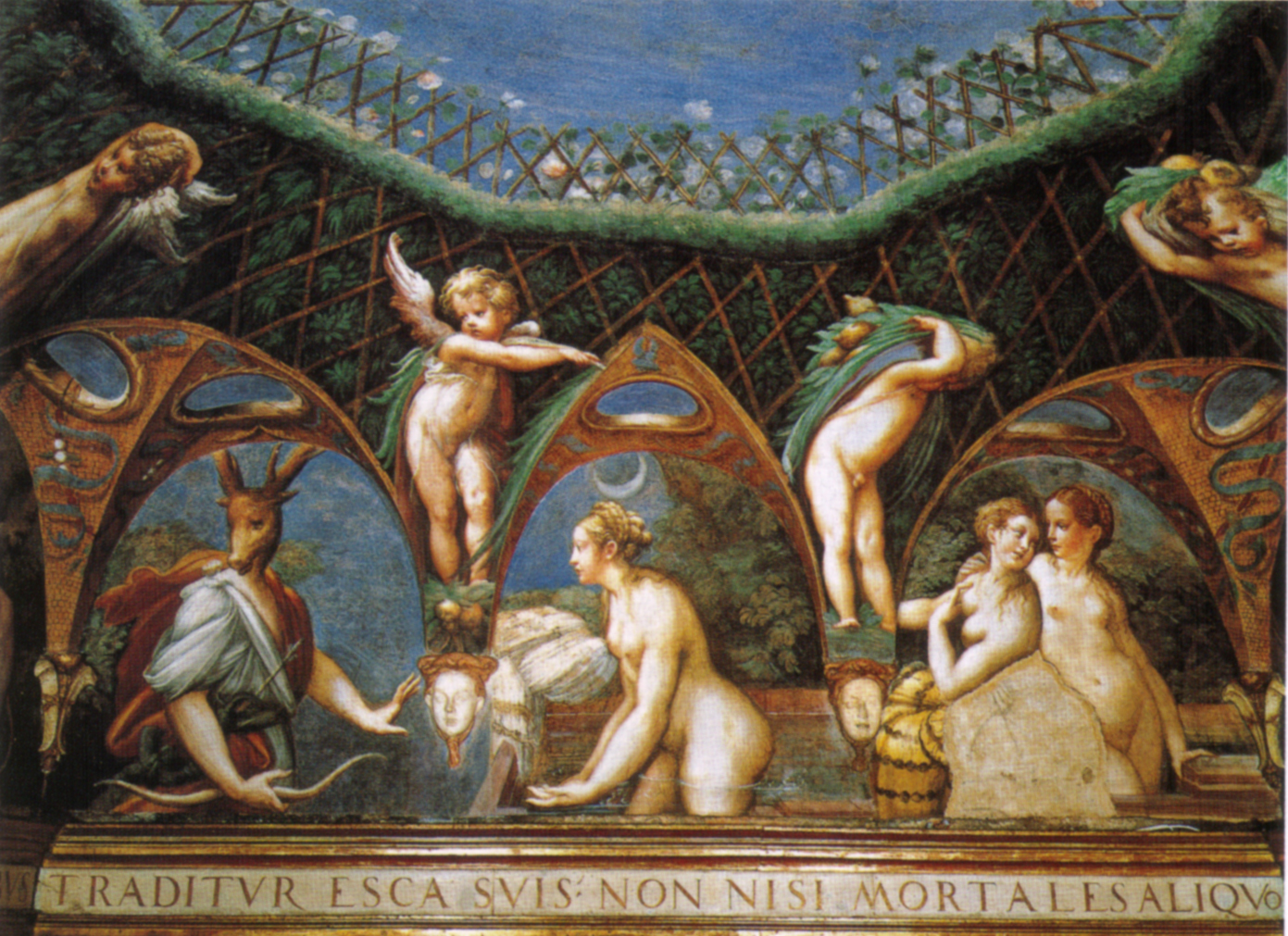 detail